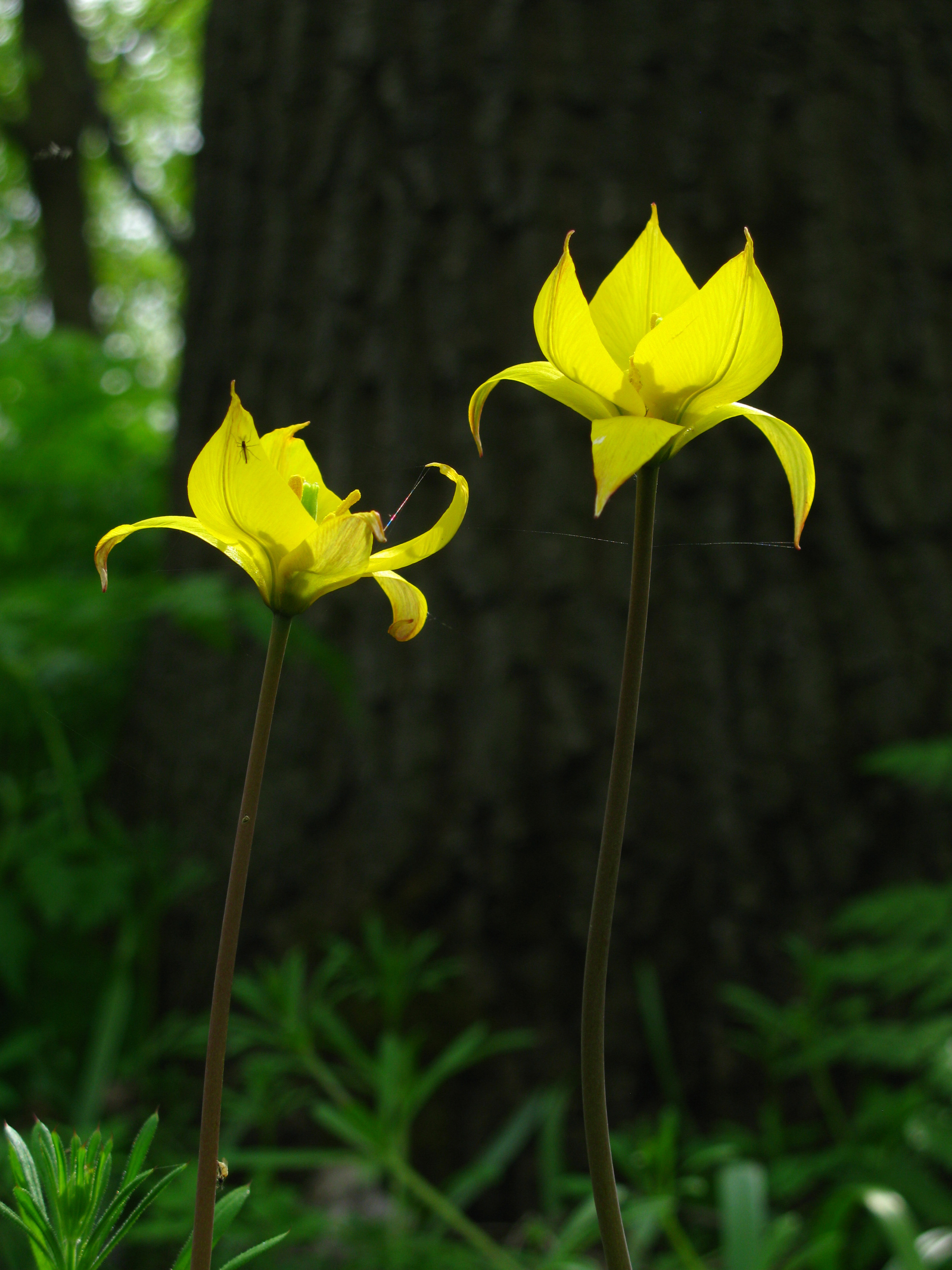 Тюльпан дібровний у байраці. Ландшафтний заказник "Старовишневецький"